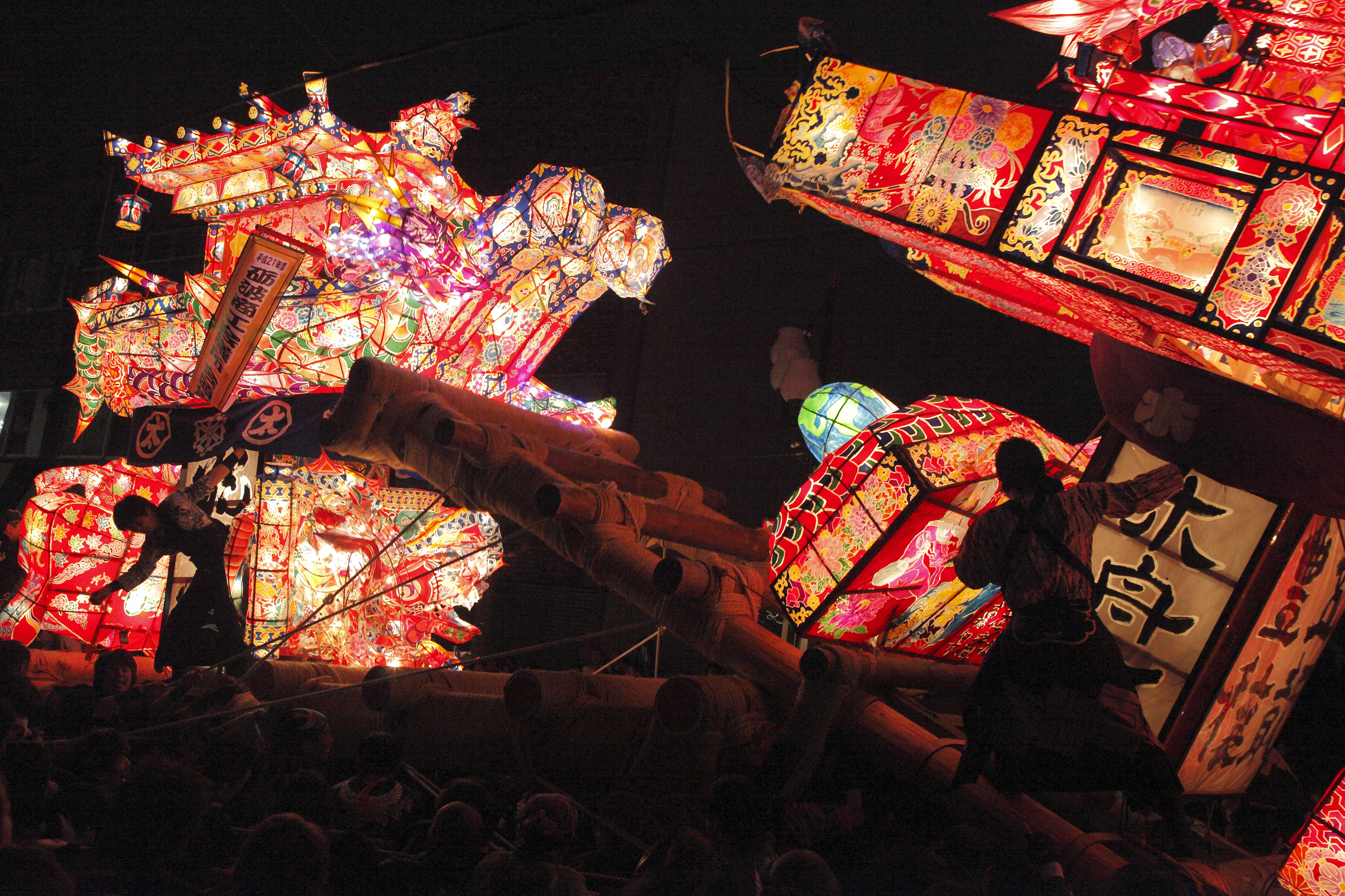 富山県砺波市で行われる喧嘩祭、夜高祭の様子です。